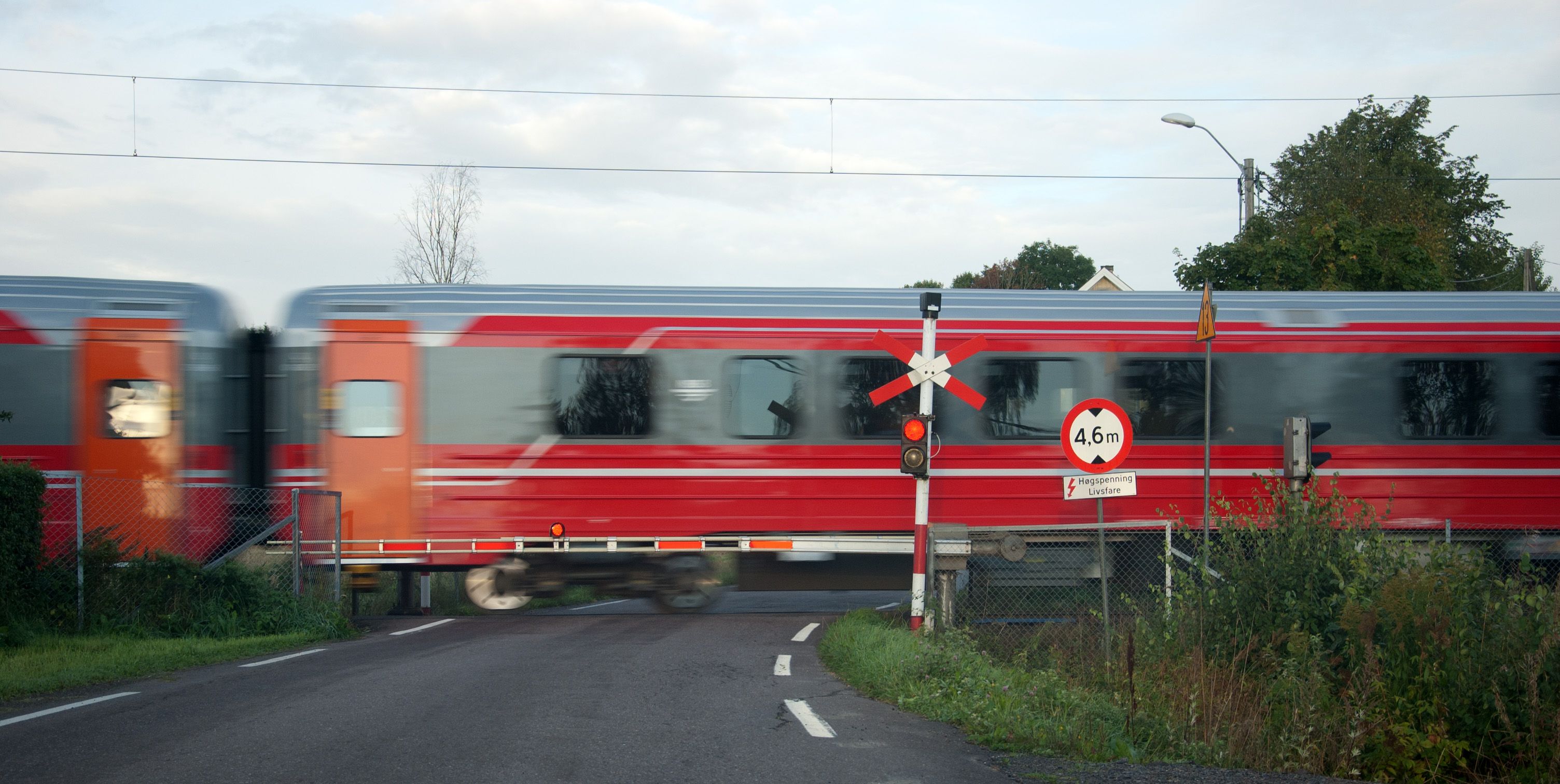 Fylkesvei 665 Solerødveien ved Adal planovergang på Vestfoldbanen i Horten, Vestfold.